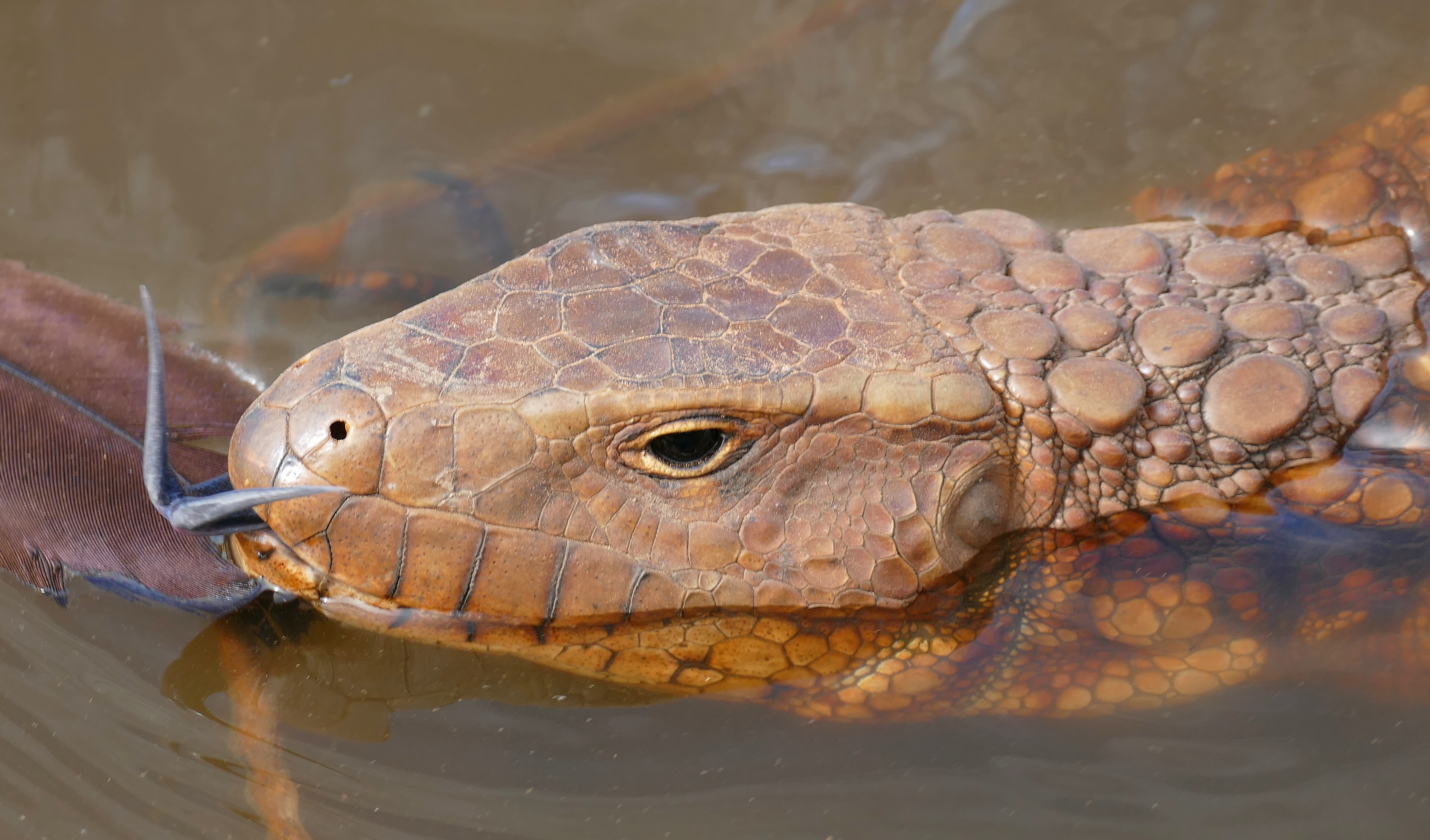 Transpantaneira, Poconé, Mato Grosso, BRAZIL